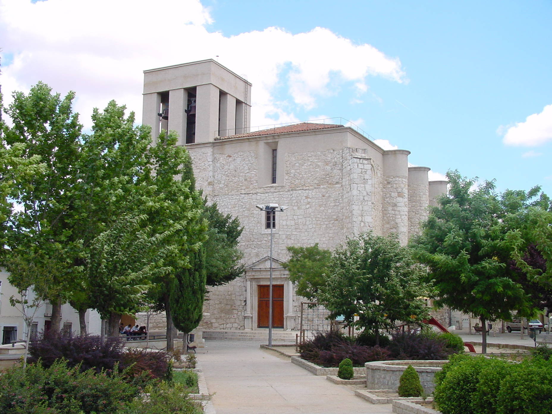 Iglesia parroquial de San Andrés Apostol en Villarejo de Salvanés.